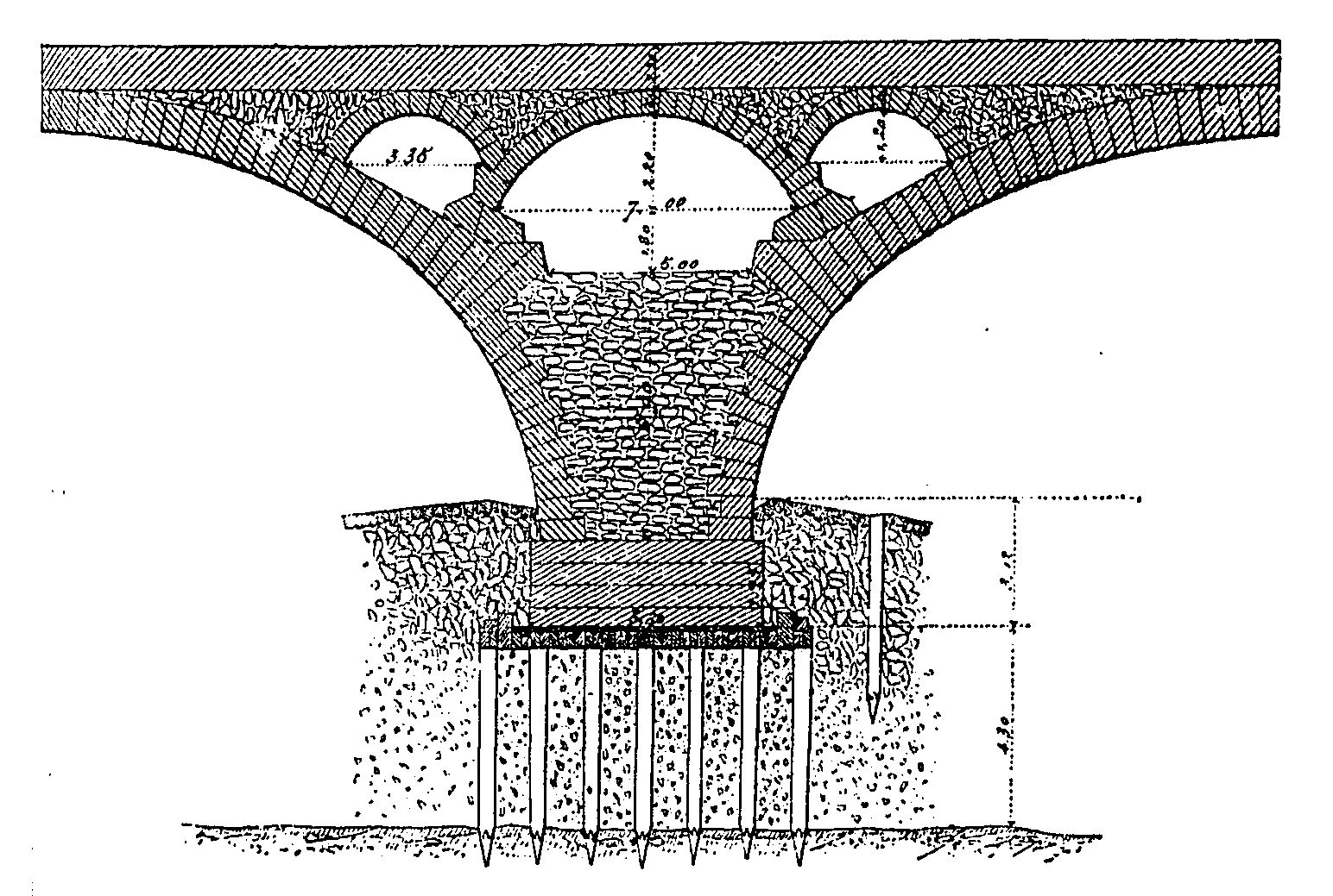 Coupe d’une pile du pont Wilson montrant un élégissement (évidement permettant d’alléger la charge), Tours, Indre-et-Loire, France